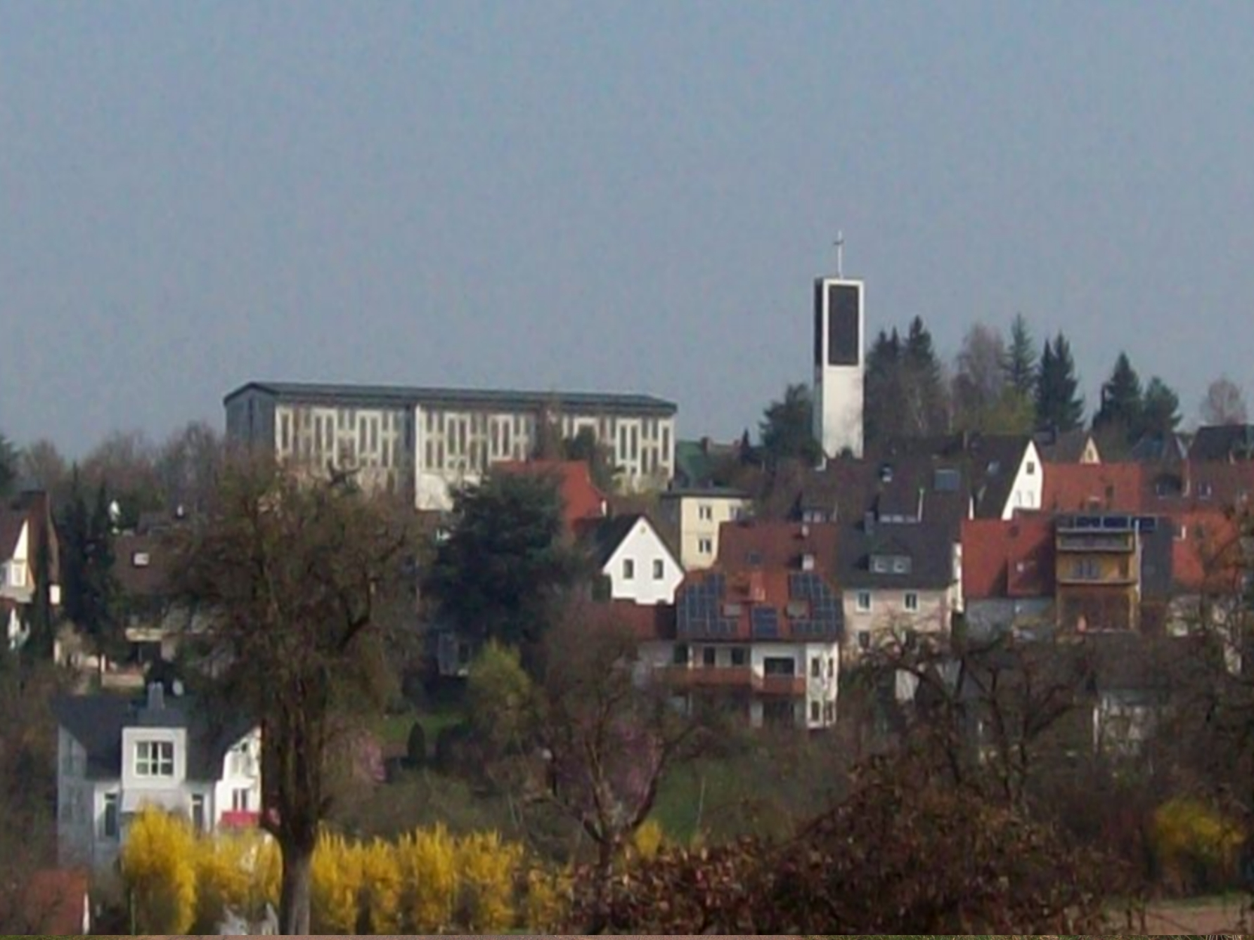 St. Gertrud Aschaffenburg Panorama